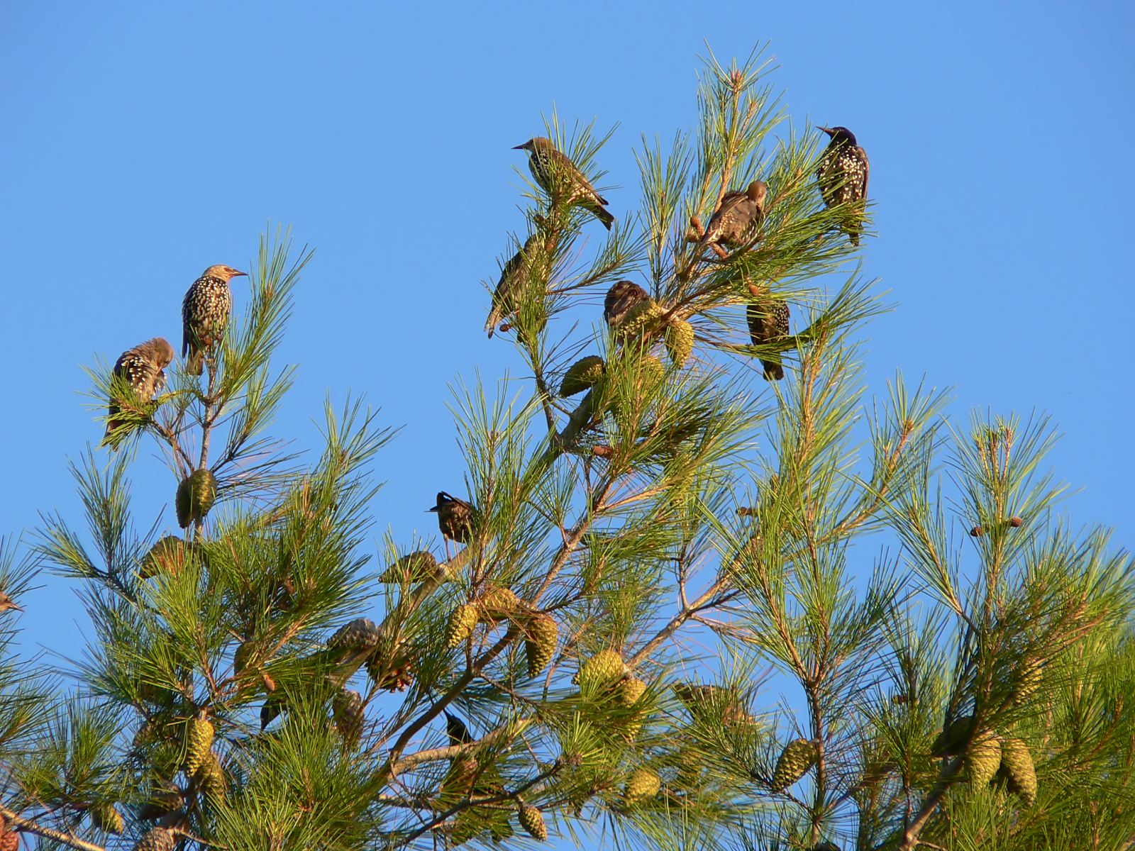 Rastende Stare in einem Aleppo-Kiefer in Südistrien Foto taken near Pula.